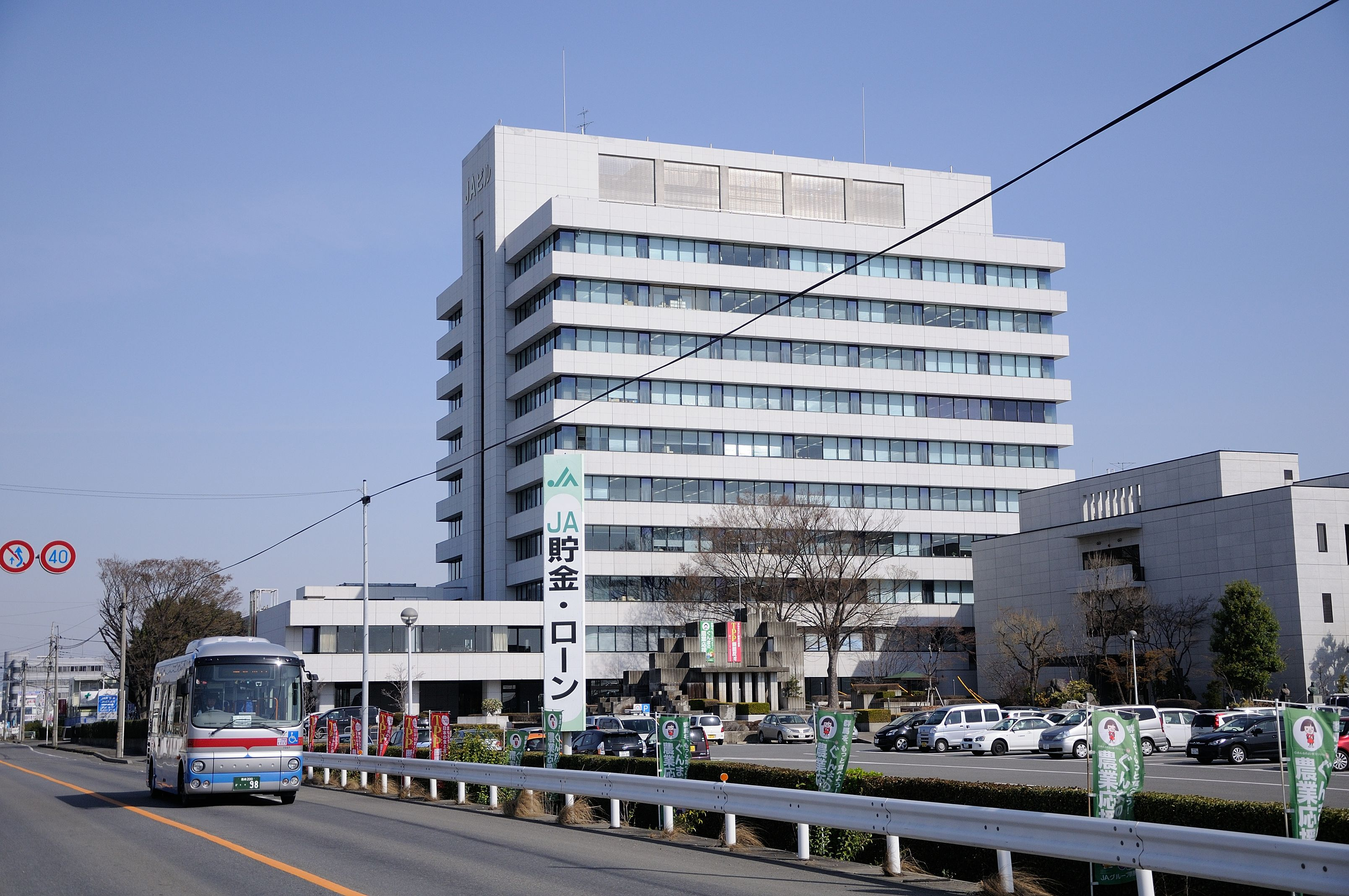 群馬県農協ビル。及び群馬バス亀里JAビル-高崎駅東口線。